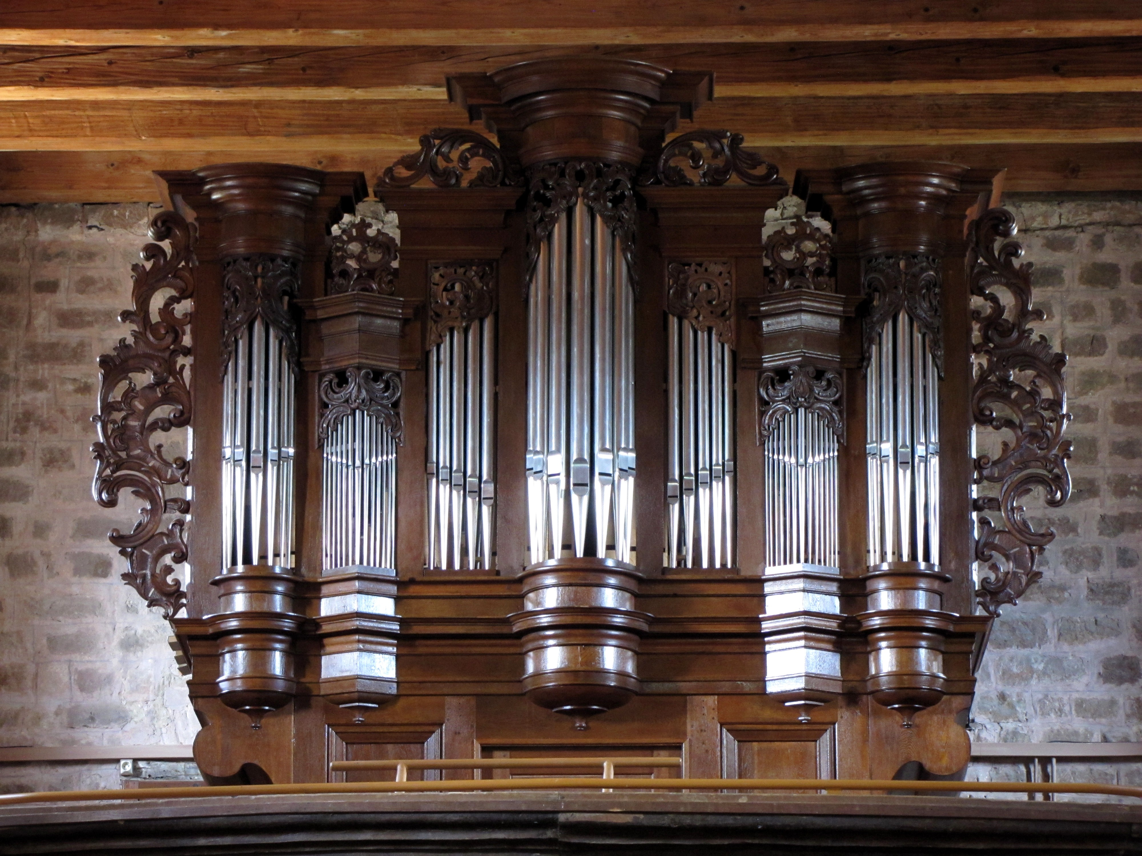 Alsace, Bas-Rhin, Wissembourg, Église Saint-Ulrich d'Altenstadt (PA00085244, IA67008249). Orgue J.C.Baumann-Koenig (1764)